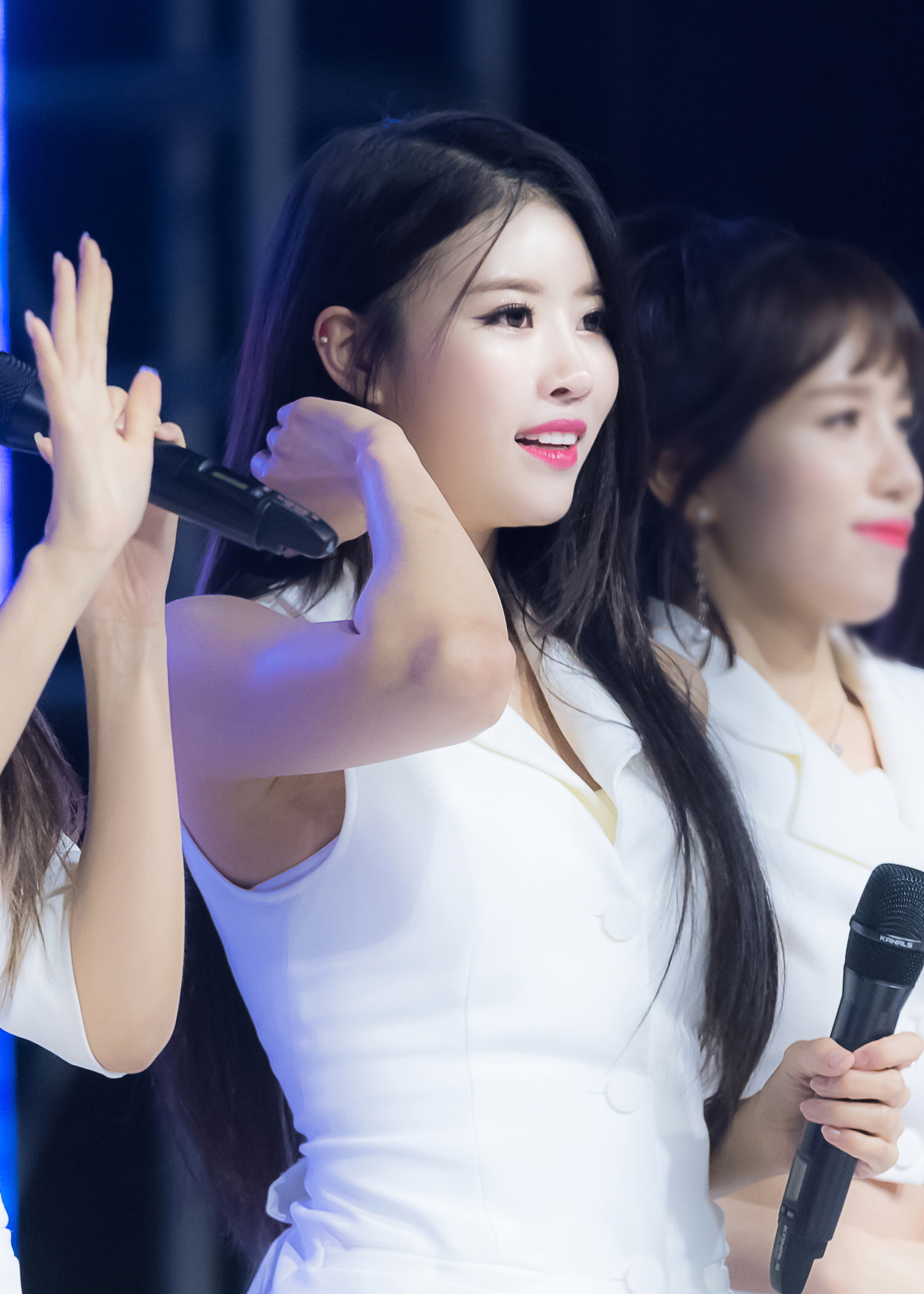 180518 수원과학대 러블리즈